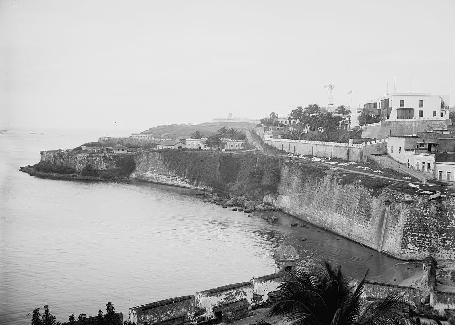 Casa Blanca and sea wall, San Juan, P.R